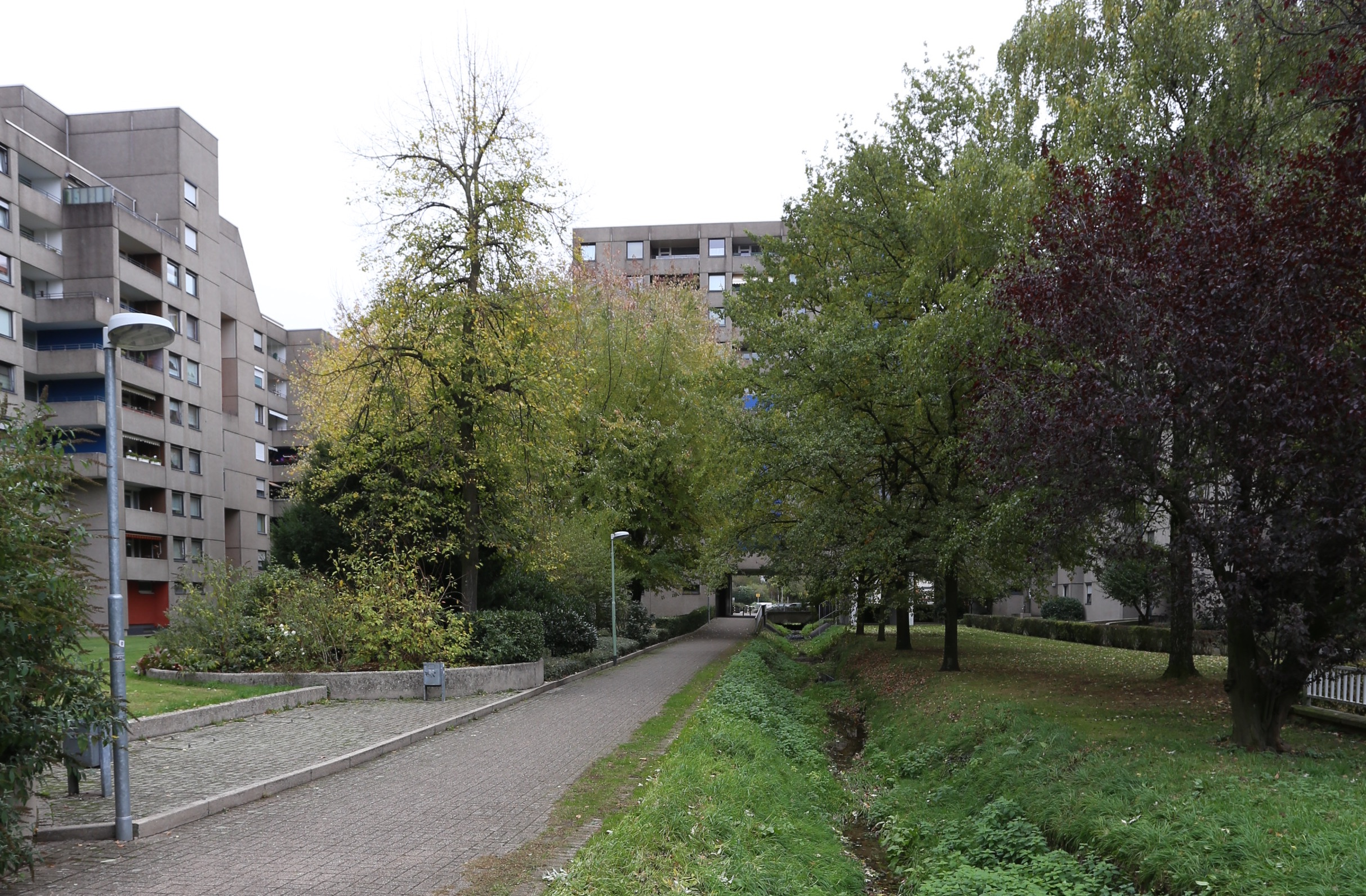 Der Haarbach fließt als landschaftliches Element unter dem schlangenförmigen Gebäudekomplex zwischen der Berliner Straße und der Westtangente